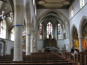 Wallfahrtskirche St. Johannes Baptist in Hirschberg-Leutershausen.